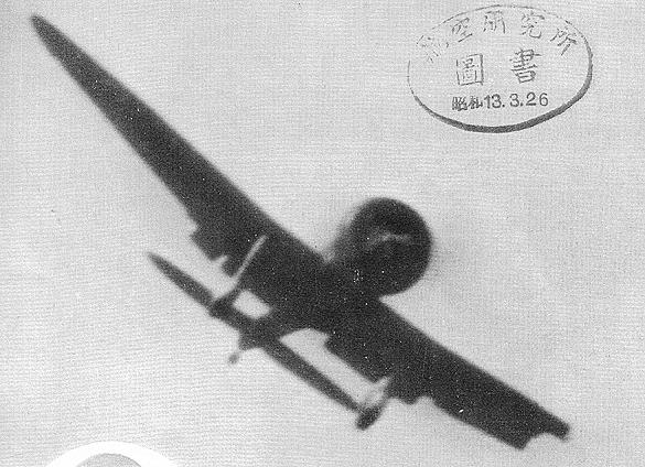 南昌攻撃で片翼を失いながら、南京上空に戻ってきた樫村寛一3空曹操縦の96艦戦。